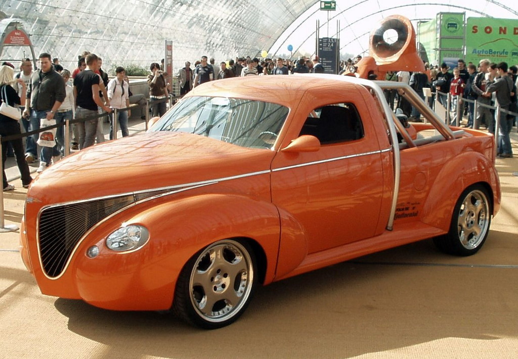 Rinspeed